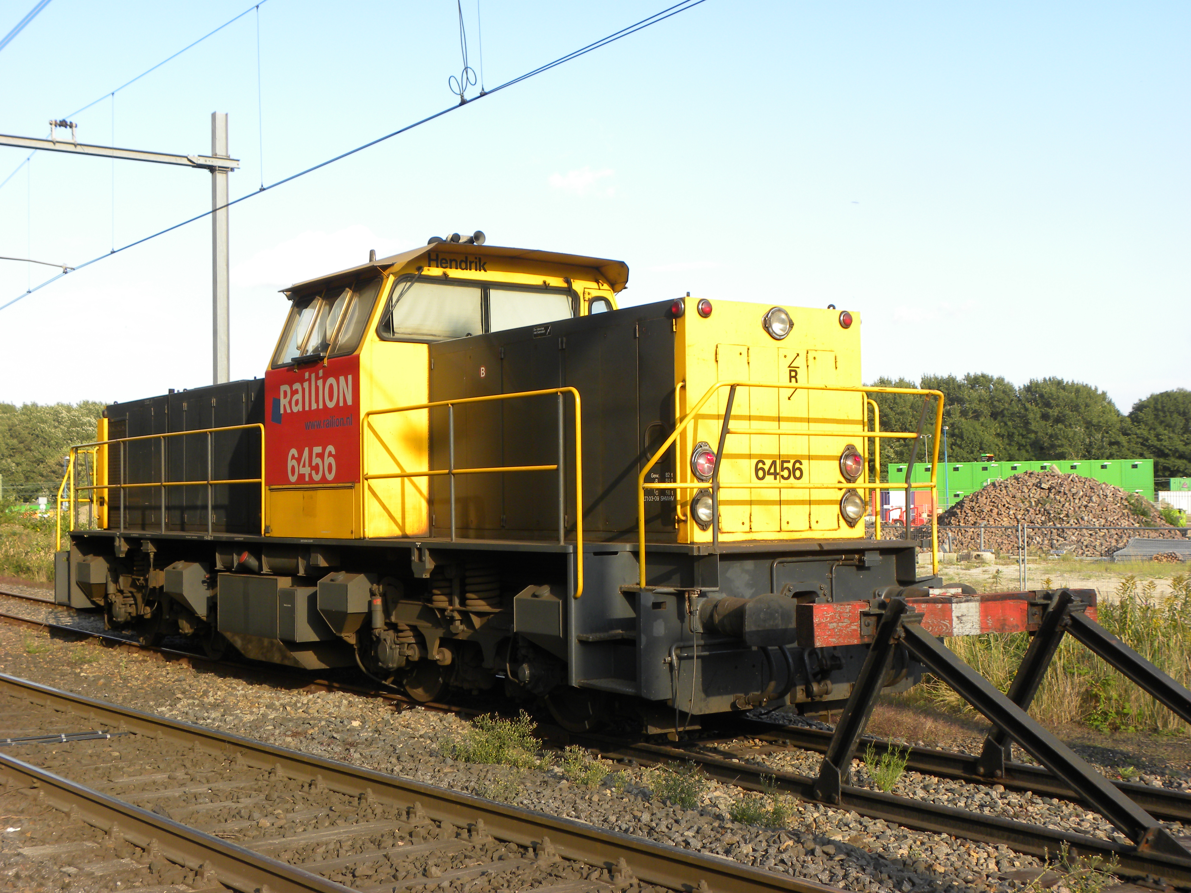 Railion 6456